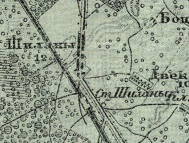 Деревня Шиланы (Шиленай). Фрагмент карты Шуберта. Из комплекта топографических карт Ковенской губернии. 1860-1890 гг. Масштаб: 3 версты в дюйме. (1 см-1260м) .(1:126000)